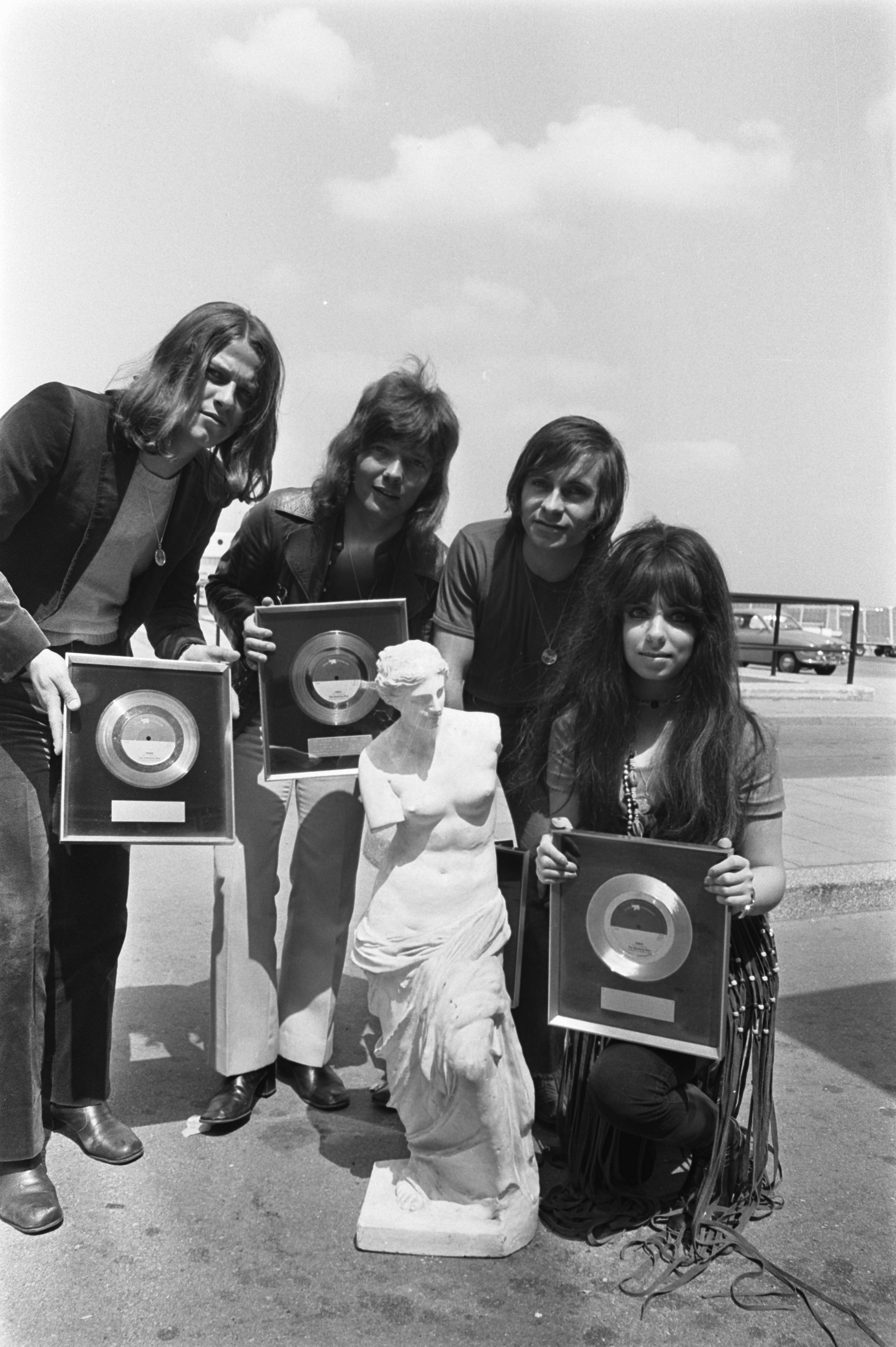 Collectie / Archief : Fotocollectie Anefo Reportage / Serie : [ onbekend ] Beschrijving : Nederlandse popgroep "Shocking Blue" arriveert op Schiphol na toernee door Amerika; Shocking Blue met gouden plaat en beeld van Venus Datum : 16 juni 1970 Locatie : Noord-Holland, Schiphol Trefwoorden : Popgroepen, beelden, toerneeen Instellingsnaam : Shocking Blue Fotograaf : Evers, Joost / Anefo Auteursrechthebbende : Nationaal Archief Materiaalsoort : Negatief (zwart/wit) Nummer archiefinventaris : bekijk toegang 2.24.01.05 Bestanddeelnummer : 923-5960 Reacties Geplaatst door Maaike op 11 september 2012 - 16:51. Persoonsnamen: Mariska Veres; Robbie van Leeuwen; Klaasje van der Wal; Cor van der Beek